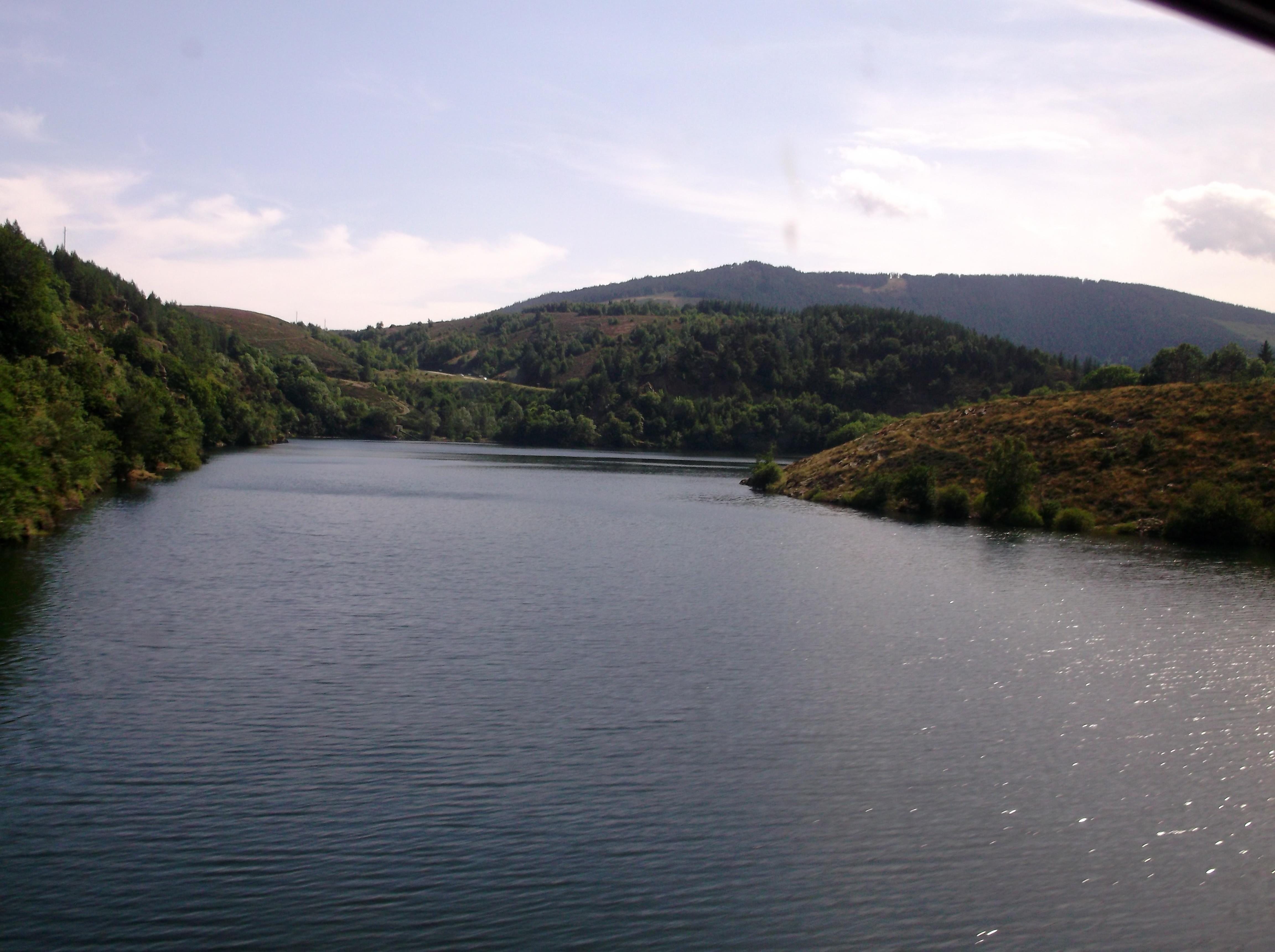 Vue du train Cevenol